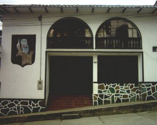 Casa de la Cultura de Macanal, Boyacá-CO